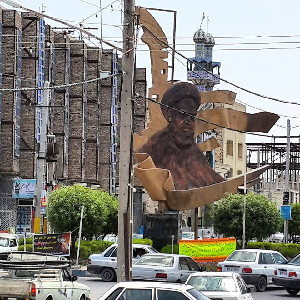 ایرانشهر فلکه ولایت